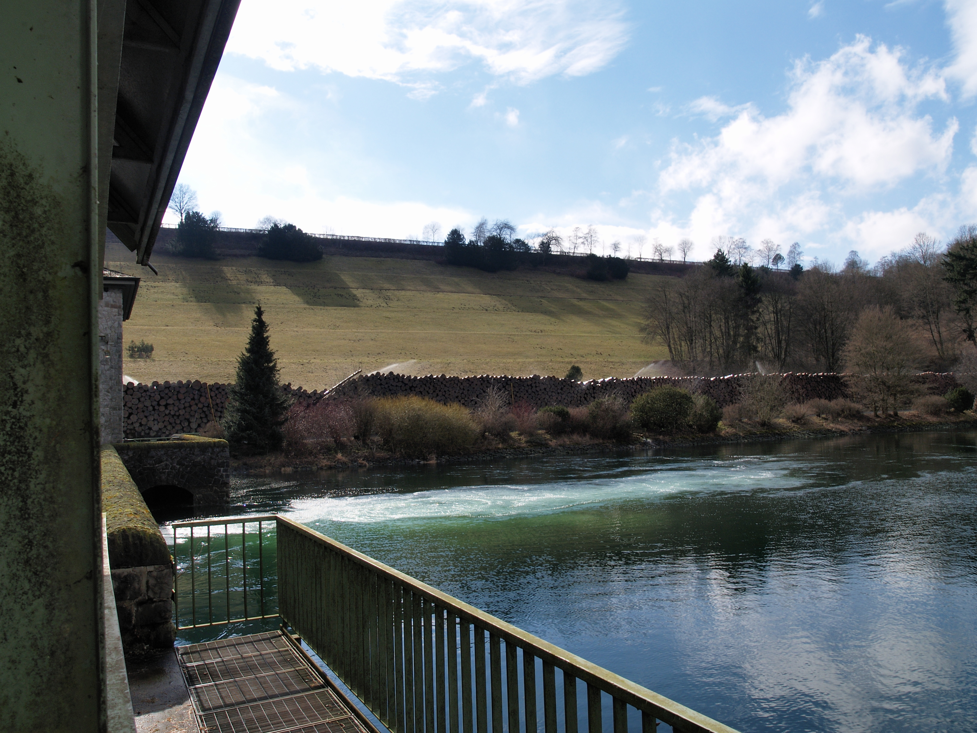 Der Sauerlandstammtisch besichtigt die Sorpetalsperre, Turbinenauslauf in den Ausgleichsweiher